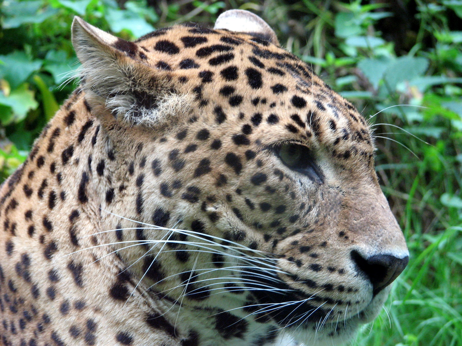 Kop van een luipaard